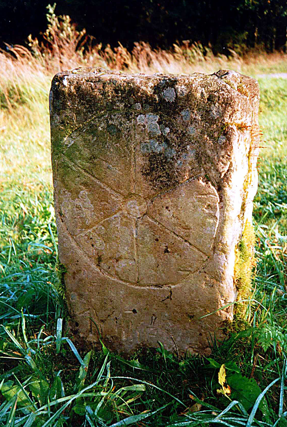 Kurmainzer Grenzstein (am Flurstück "Weißer Stein")